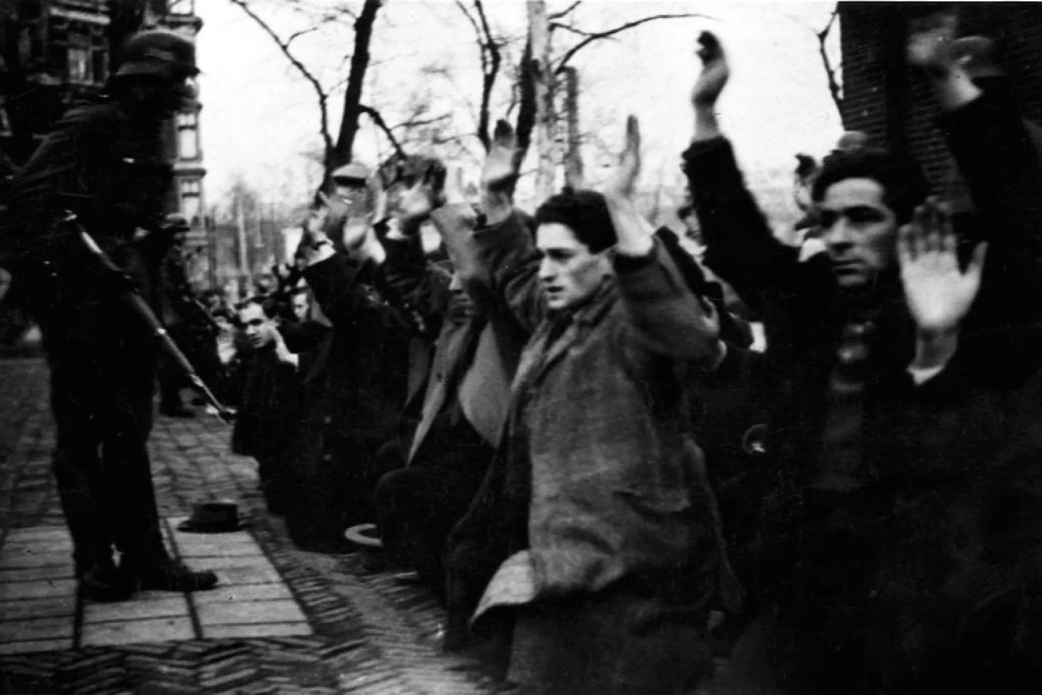 Jodenvervolging, Tweede Wereldoorlog, WO II, februari 1941. Razzia op Joden. Geknielde Joden worden onder schot gehouden door de Grüne Polizei op het Jonas Daniël Meijerplein in Amsterdam. De man met zijn handen omhoog net rechts van het midden van de foto is Meier Vieijra, een van de 427 joodse mannen die op 22 en 23 februari 1941 werden opgepakt. De tweede jongen op de foto is volgens schrijver Maurice Ferares de op dat moment 21-jarige Emile Kets de Vries. Via interneringskamp Schoorl werden de mannen naar Duitse concentratiekampen gevoerd waar vrijwel niemand overleefde. De foto werd na de Tweede Wereldoorlog hét icoon van de Jodenvervolging in Nederland en de Februaristaking.